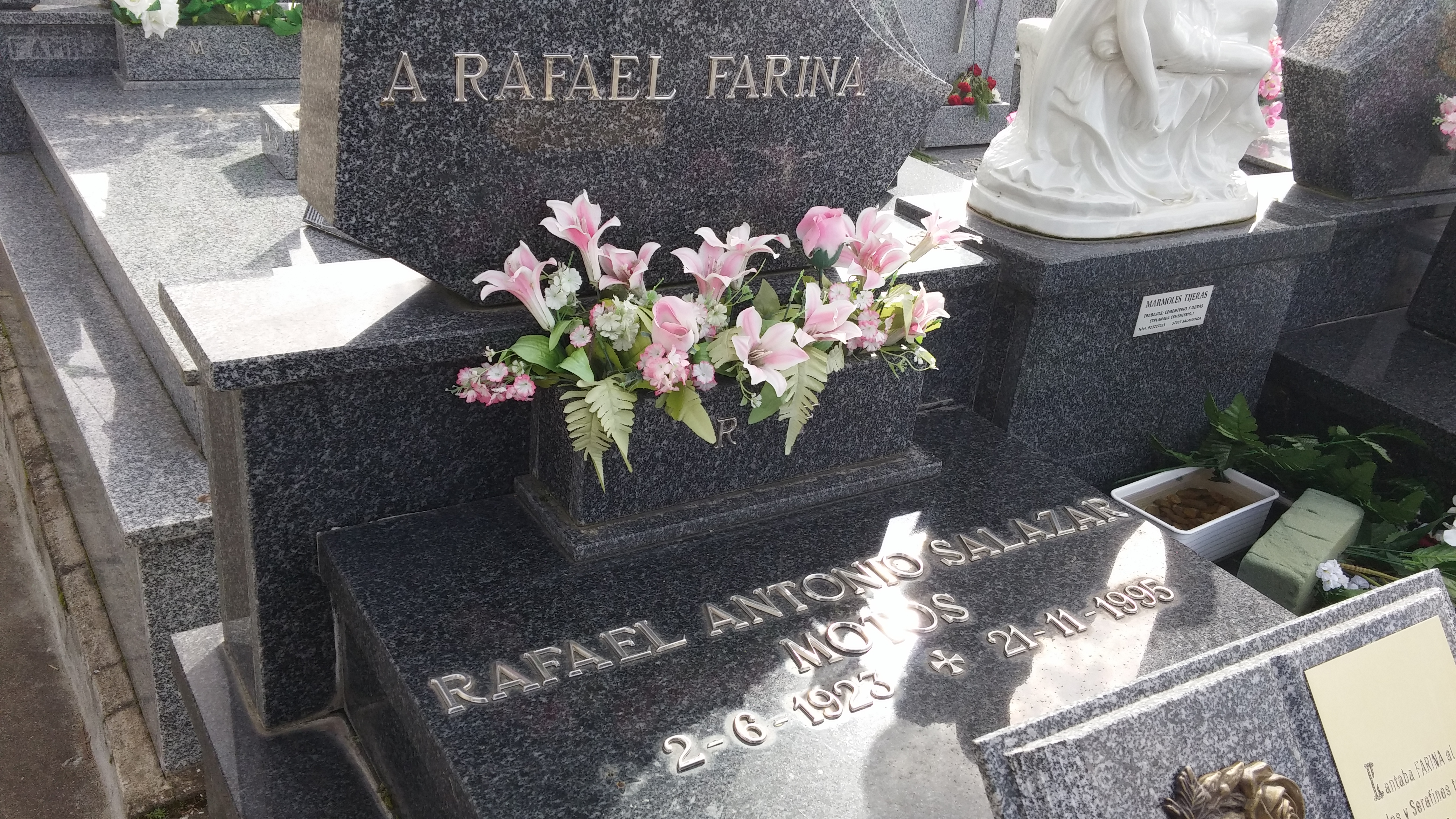 Fotografía de la tumba de Rafael Farina, en el cementerio de Salamanca en España.